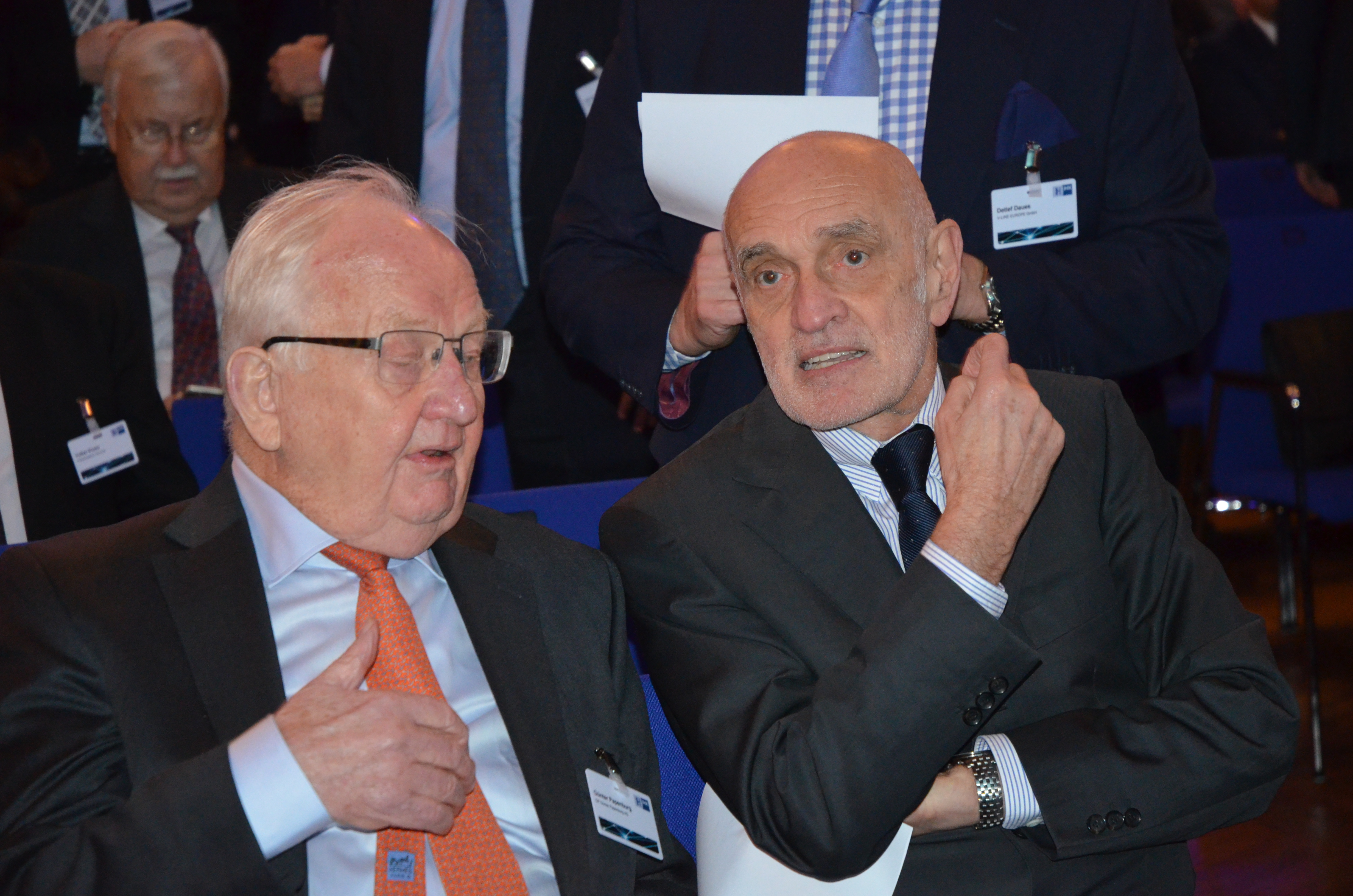 Die Industrie- und Handelskammer Hannover veranstaltete am 8. Januar 2018 im Kuppelsaal des Hannover Congress Centrums den Neujahrsempfang für ihre Mitglieder und Gäste unter dem Titel „Auftakt der IHK Hannover“ Dabei kommen Unternehmer auch untereinander ins Gespräch, wie hier der Bauunternehmer Günter Papenburg (links) und der deutsch-schweizerische Eigentümer und Geschäftsführer der Kind Gruppe, Martin Kind ...